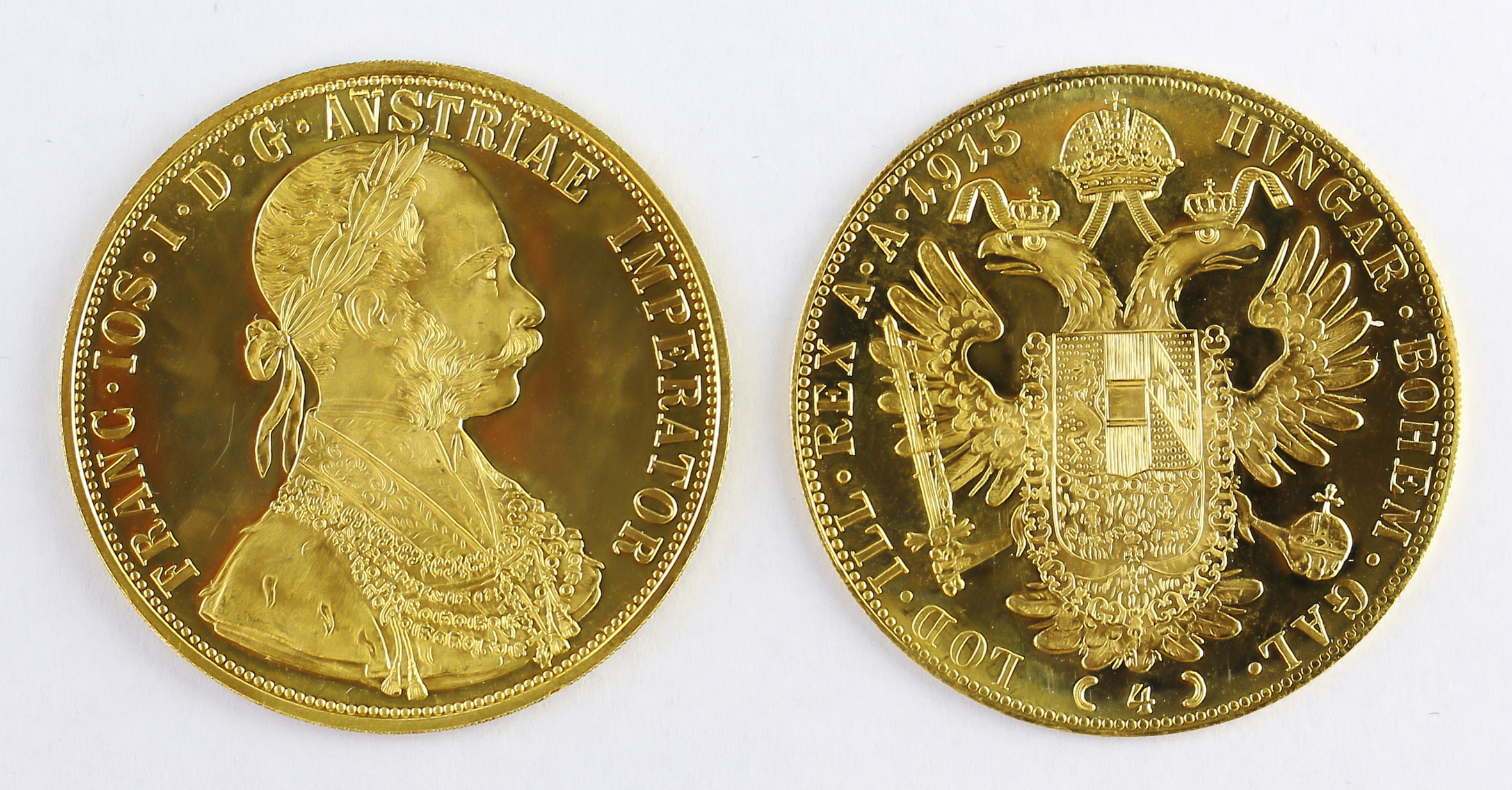 Österreichischer 4-fach Dukat mit Jahreszahl 1915. Vorderseitig Brustbild von Kaiser Franz Joseph I. und rückseitig der Doppeladler der Monarchie. Der Dukaten wurde in Österreich zwischen 1852 und 1914/15 geprägt. Ab 1858 verlor er seine Eigenschaft als gesetzliches Zahlungsmittel. In der abgebildeten Form wurde er von 1872 bis 1914/15 geprägt. Als Traditionsmünze für Geschenk- und Investitionszwecke wird er mit der Jahreszahl 1915 nachgeprägt. Durchmesser: 39,50 mm; Dicke: 0,72 mm; Feinheit: 986/1000 (Dukatengold); Feingewicht: 13,576 g; Rauhgewicht: 13,769 g